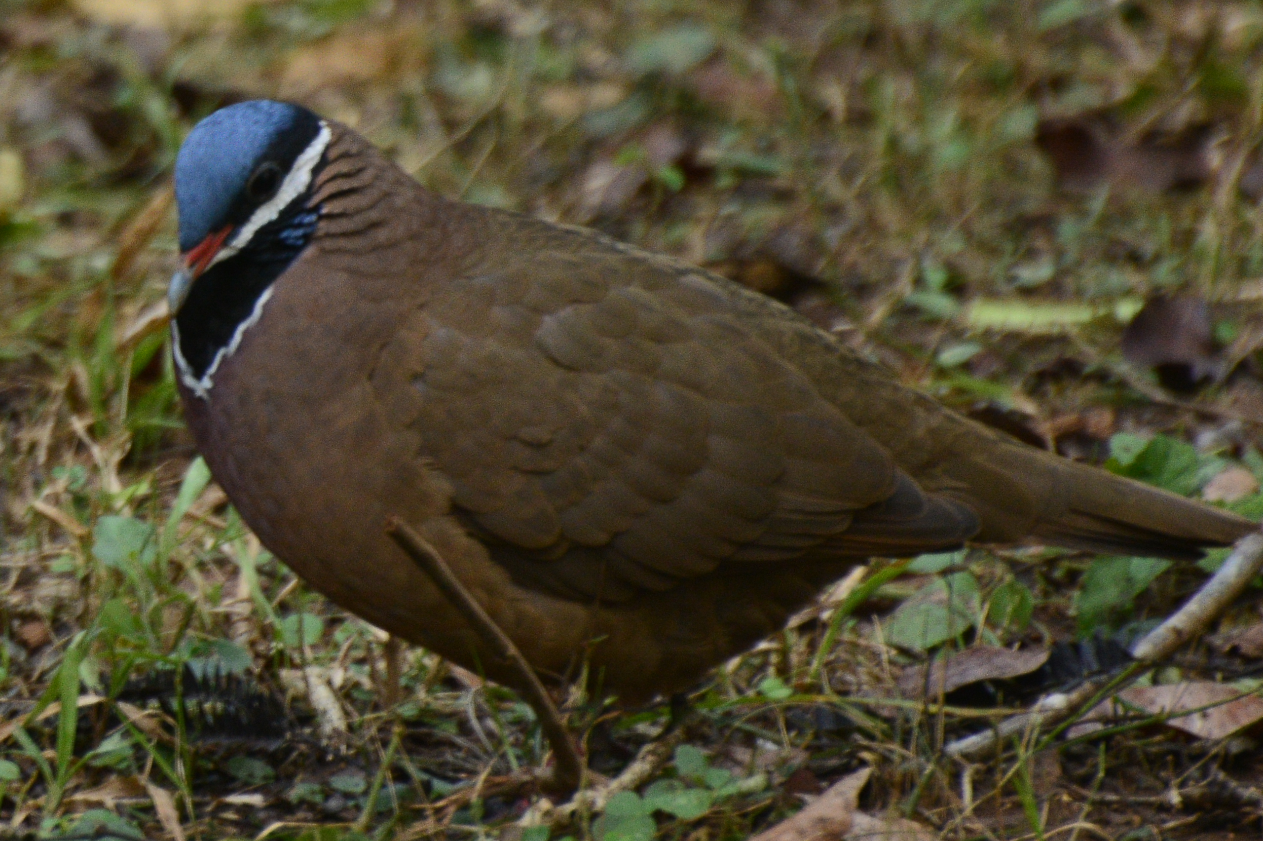 Paloma Perdiz (Starnoenas cyanocephala) Ciénaga de Zapata Cuba